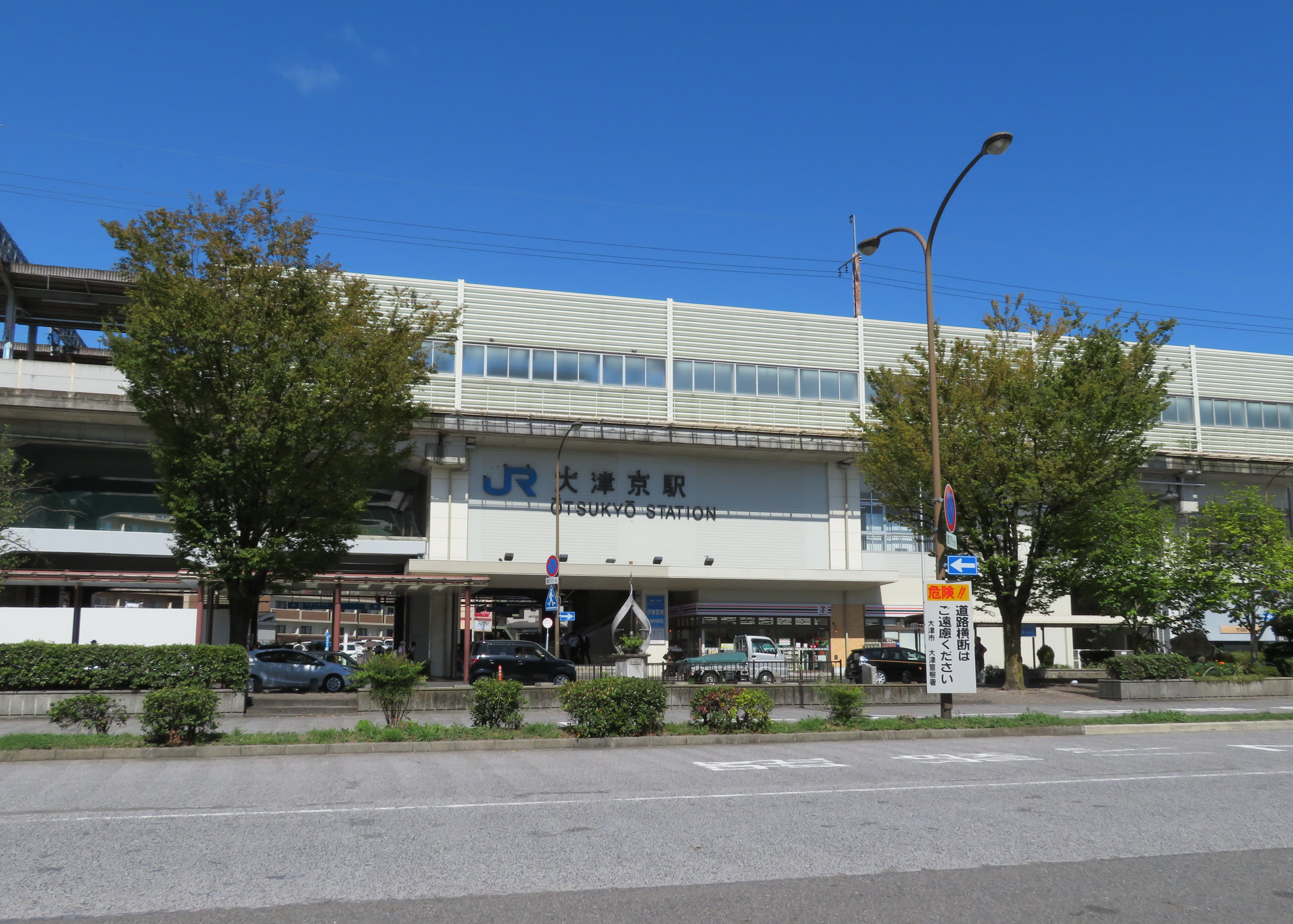 JR大津京駅